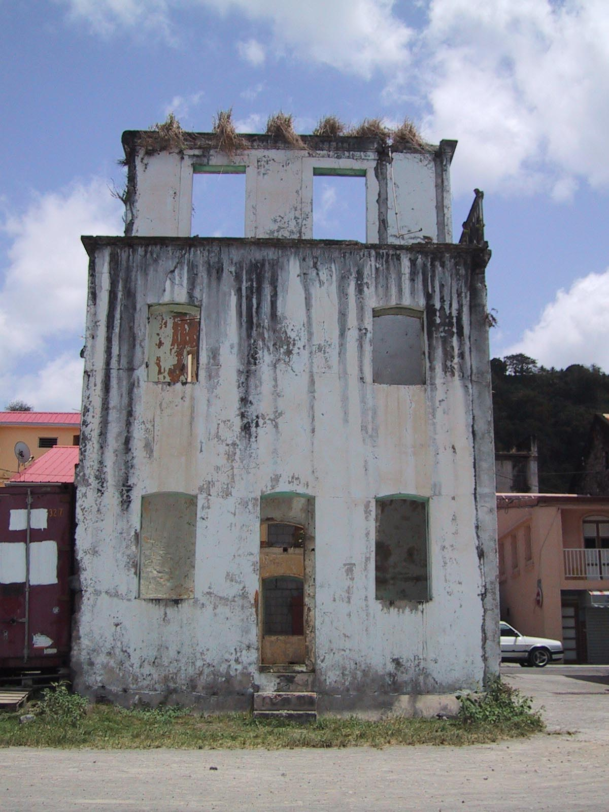 Ruine à Saint Pierre , Martinique